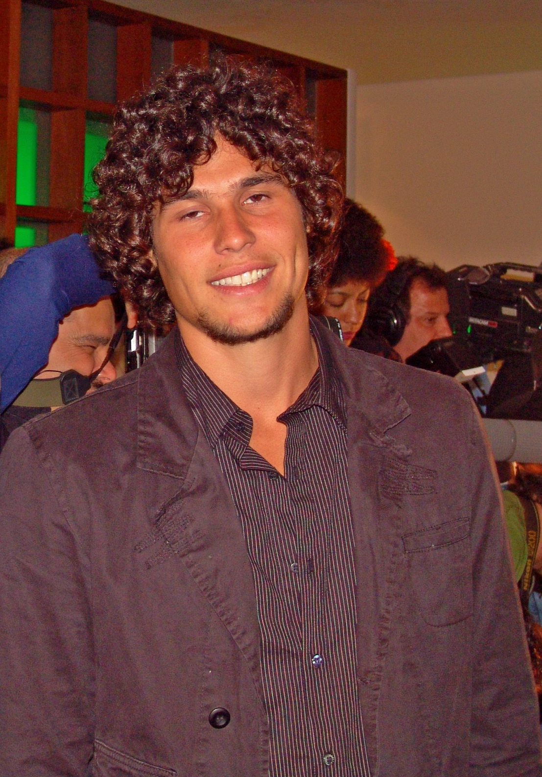 Dudu Azevedo em 2006.